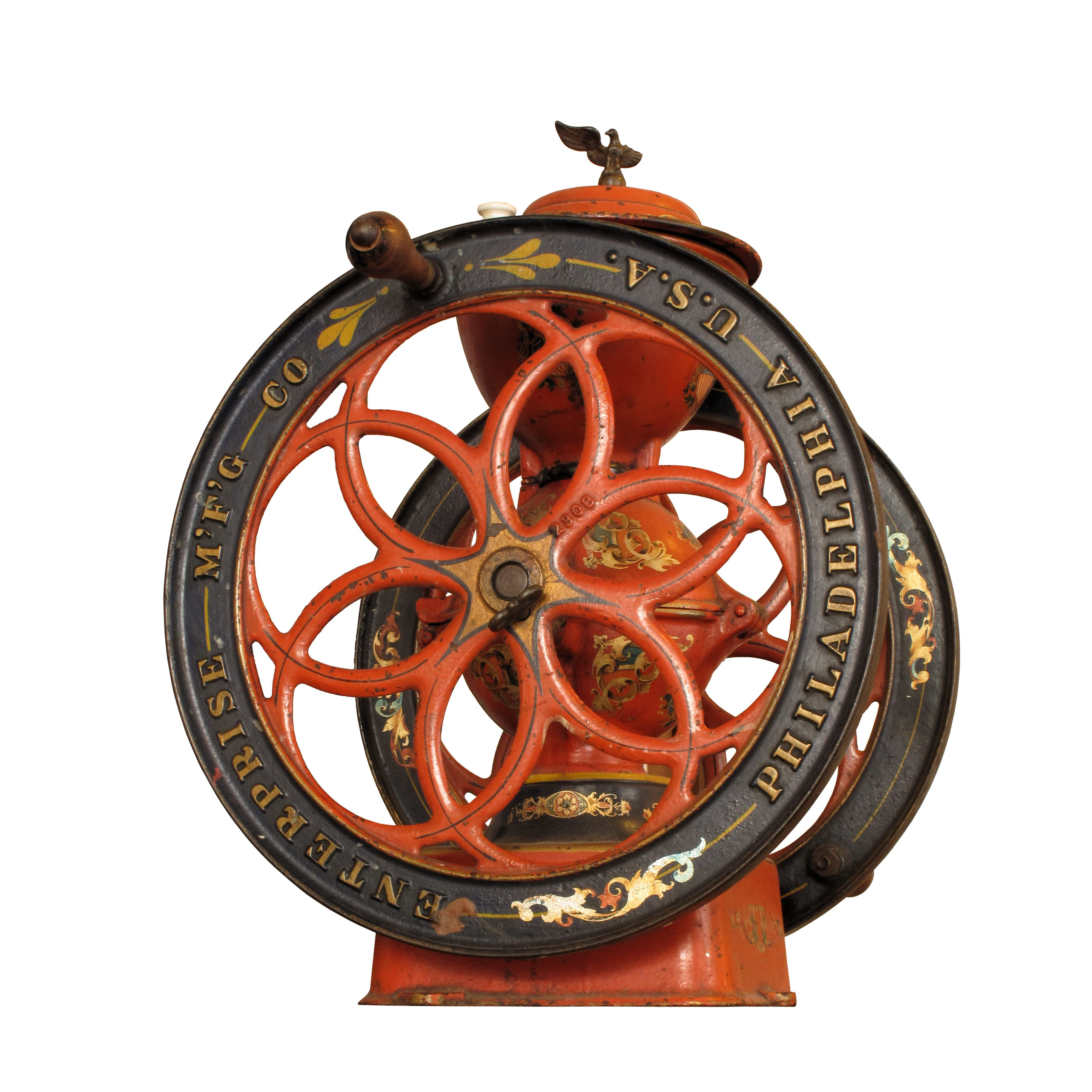 Coffee grinder